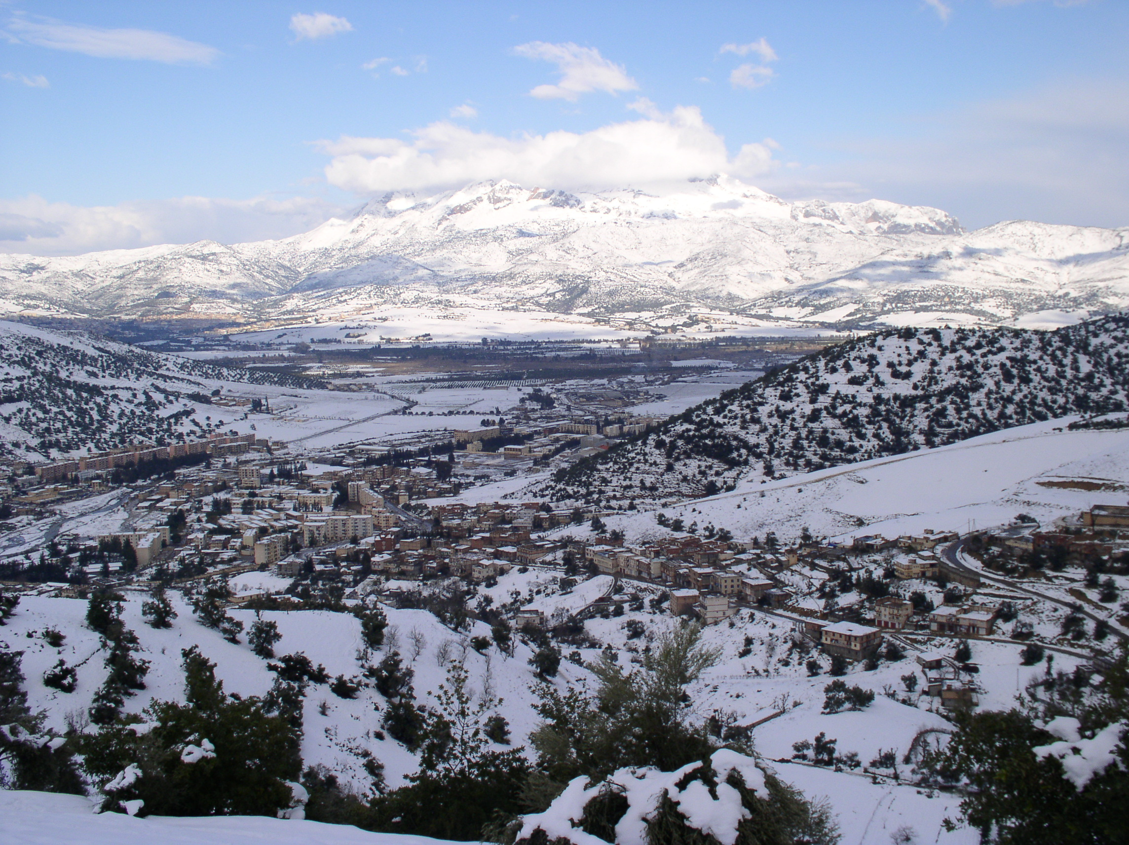 Vue d'une partie d'Amizour sous la neige en 2005